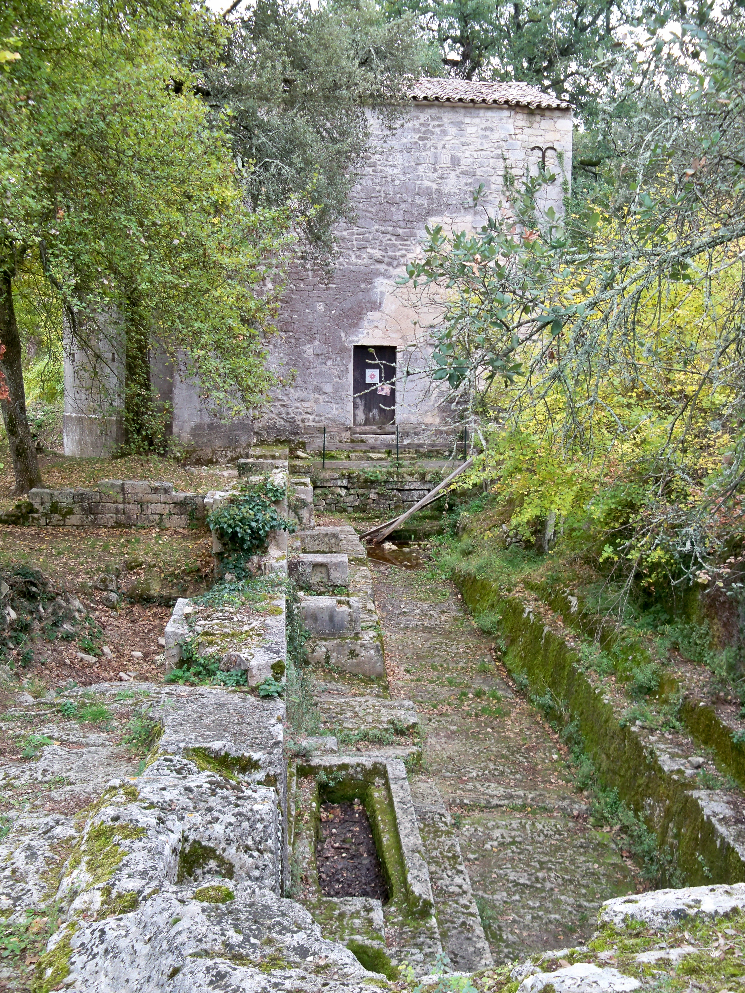 Chapelle du Prieuré de Carluc, à Céreste, Alpes de Haute Provence, France